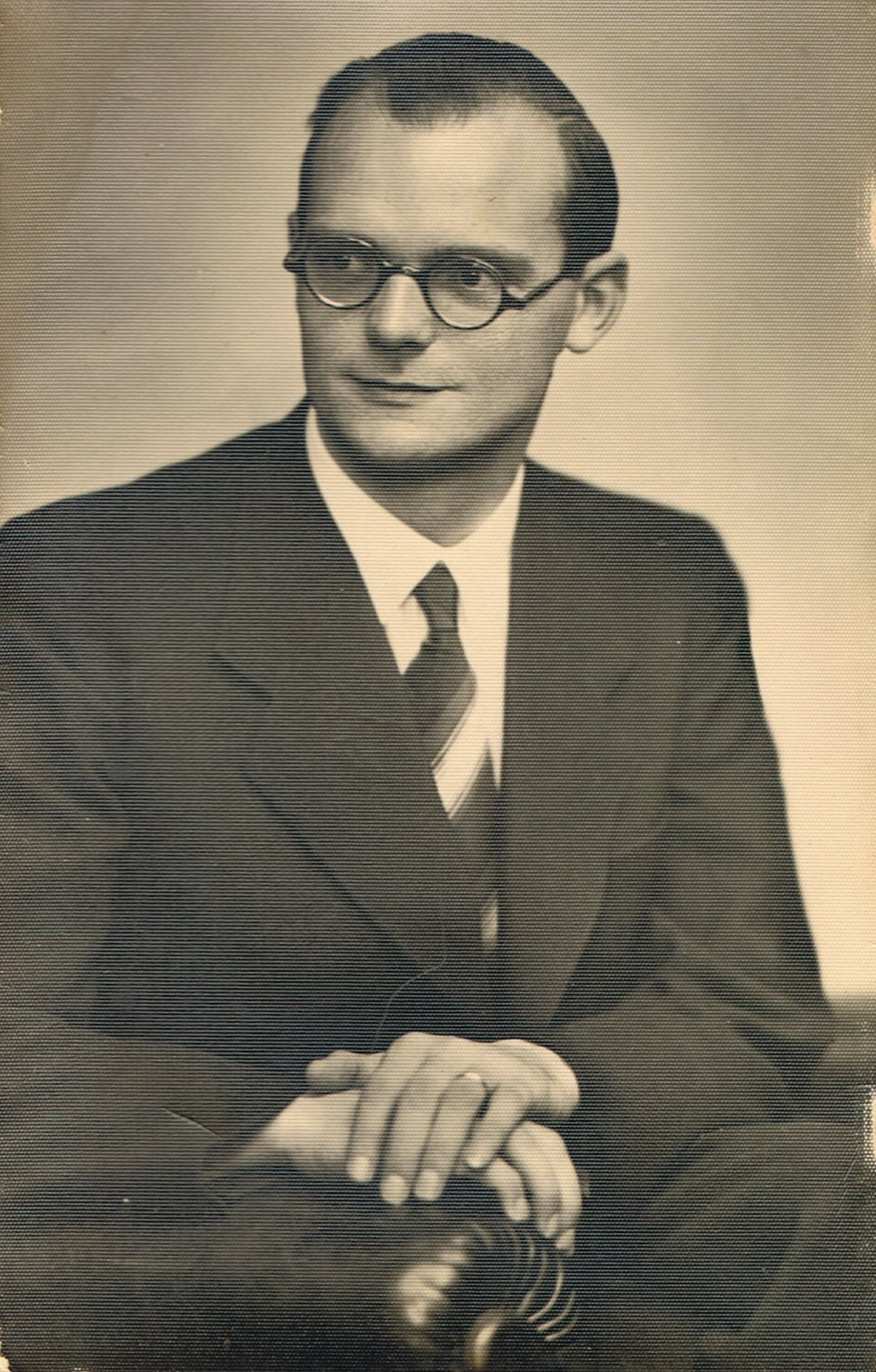 Pfarrer Wilhelm Viertmann ca. 1940